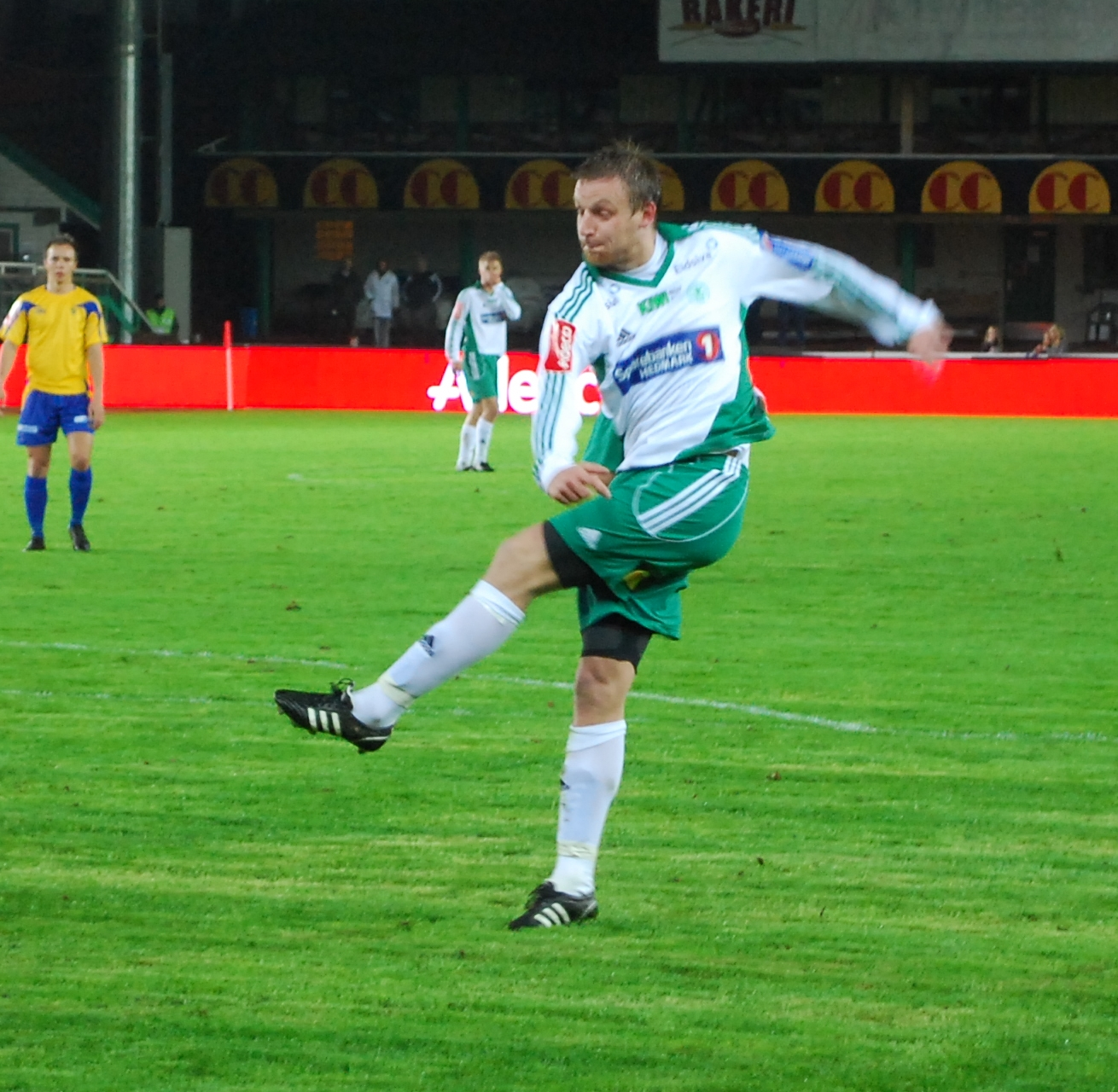 Tommy Øren, fotballspiller hos Hamarkameratene.